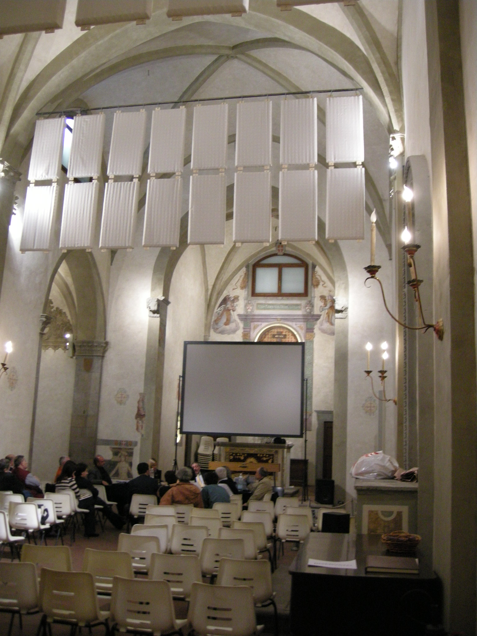 San Jacopo in Campo Corbolini, interno